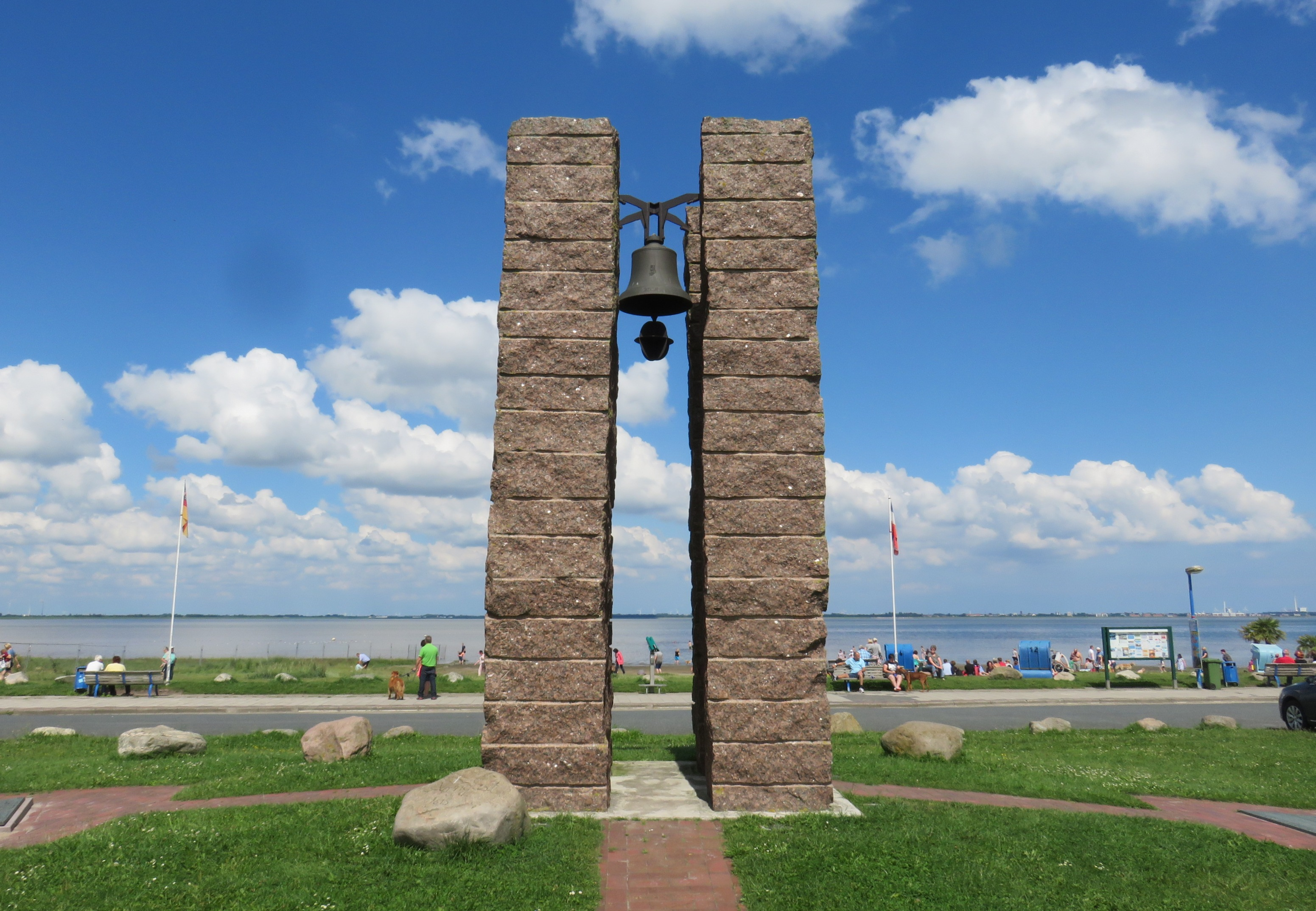 Der Friesendom am Strand von Dangast.